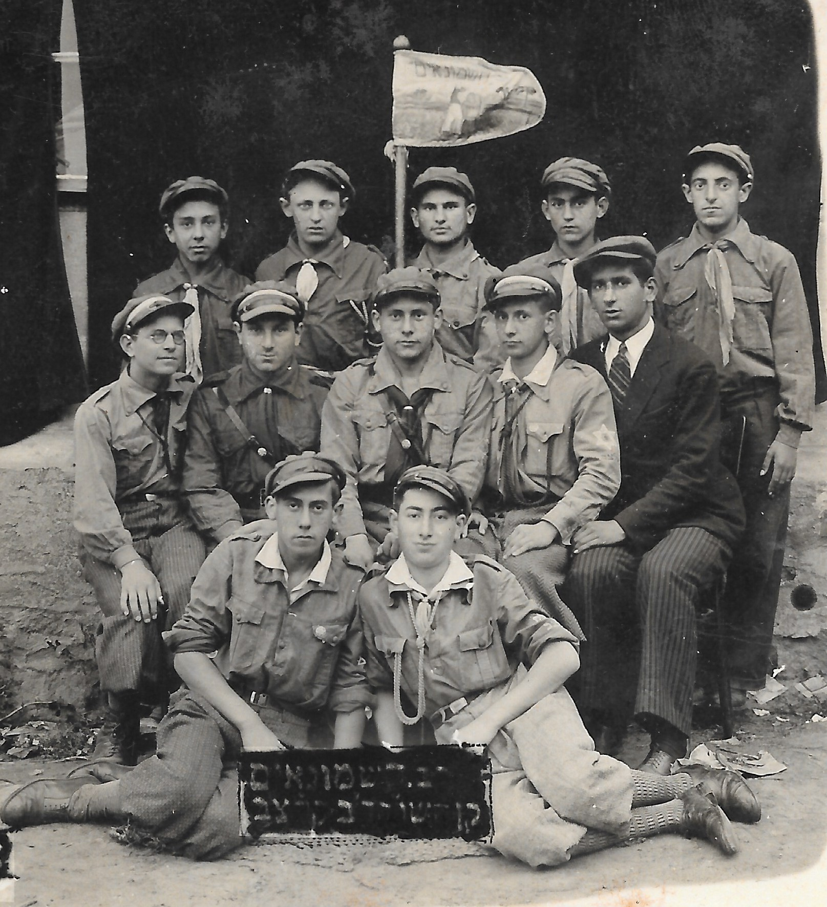 קבוצת החשמונאים, קן השומר הדתי, אלול תרצד, קלצ'ב פולין. (חלקם נספו בשואה, מקצתם עלו לישראל)